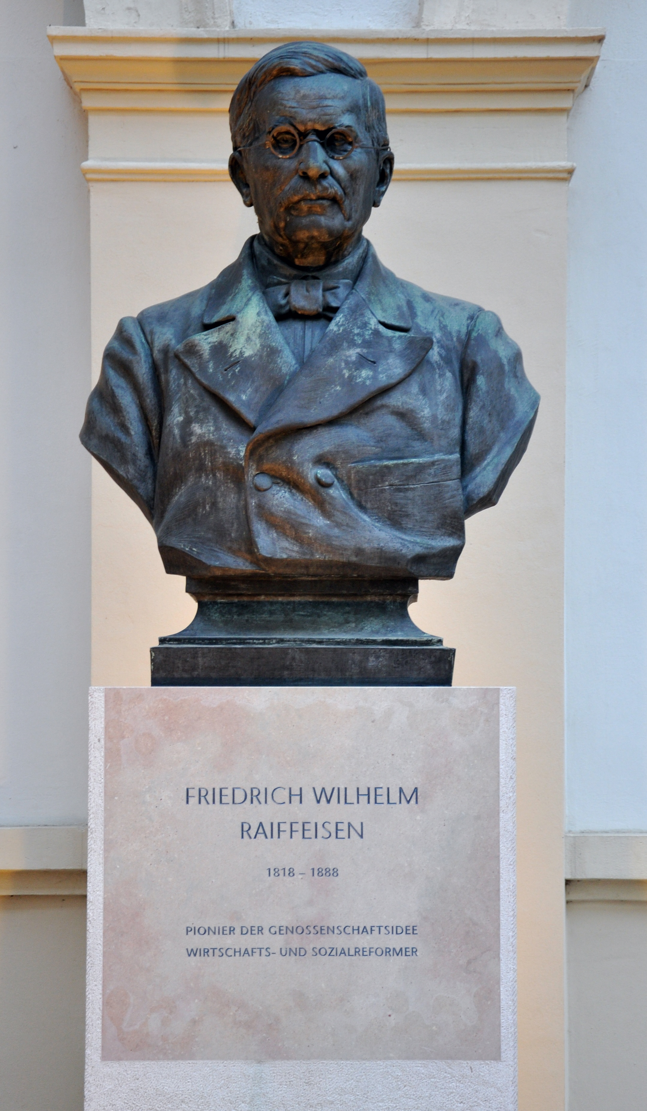 Wien, Denkmal für Friedrich Wilhelm Raiffeisen im Hof des Palais Niederösterreich, Bronze, 1985 (im Dehio Wien I kein Bildhauername)